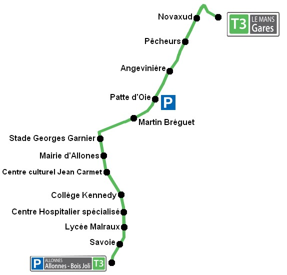 Tracé géographique de la ligne T3 (BHNS) du réseau SETRAM